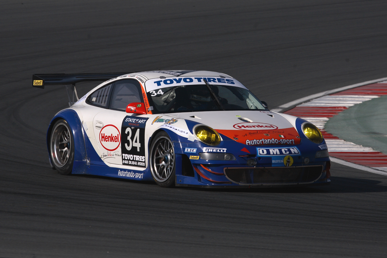 Richard Lietz im Autorlando Porsche 911 GT3 RSR beim 24-Stunden-Rennen von Dubai 2009